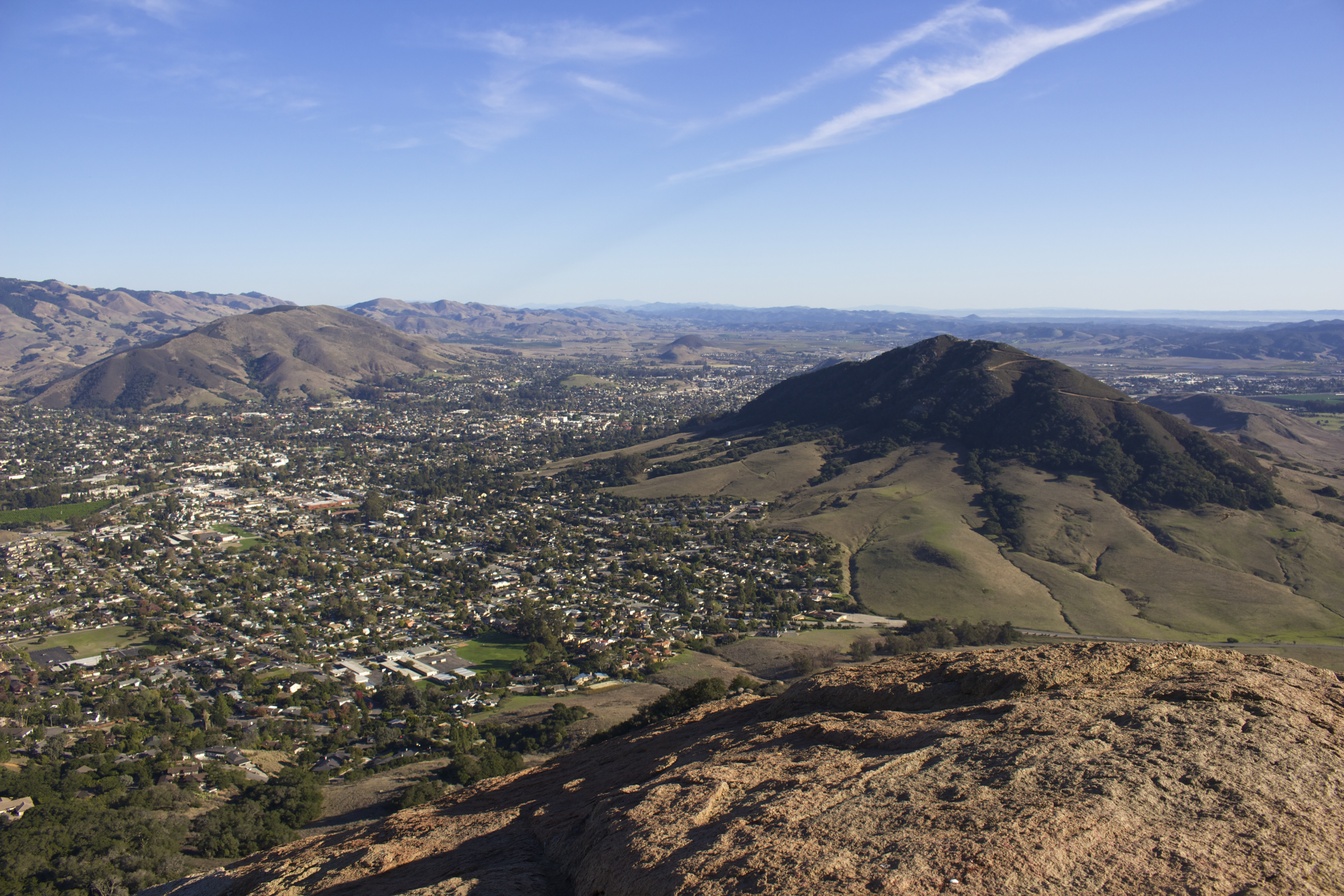 The view of San Luis Obispo from Bishop's peak